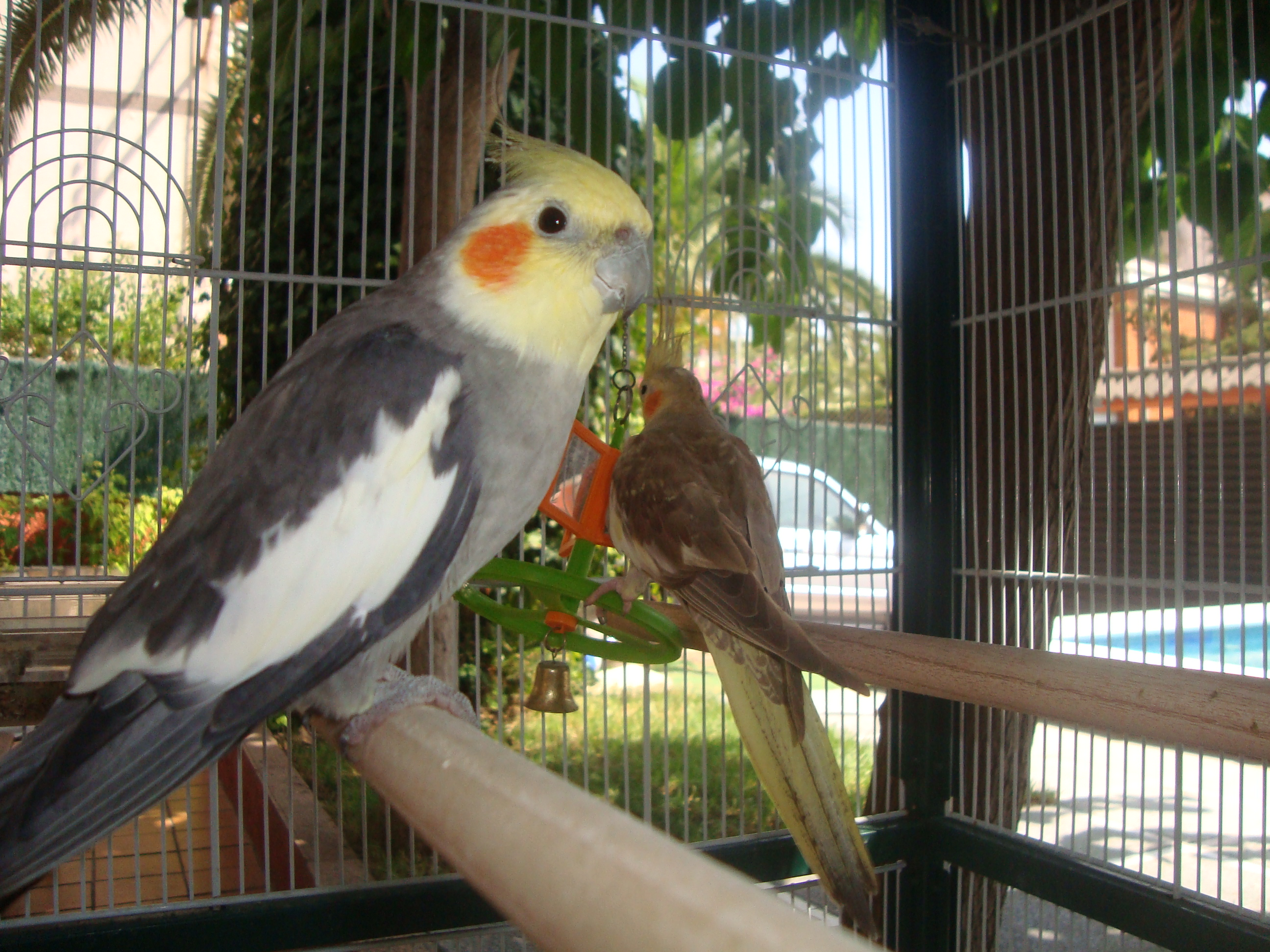 Ninfas australianas